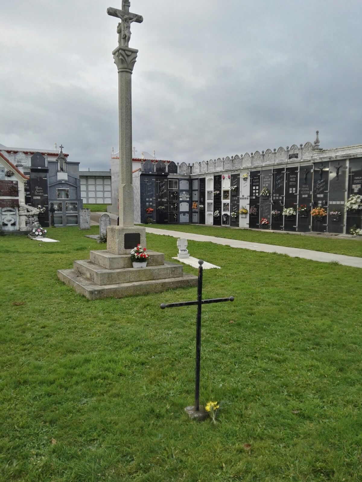 Tumba do pintor Francisco Miguel no cemiterio de Bértoa